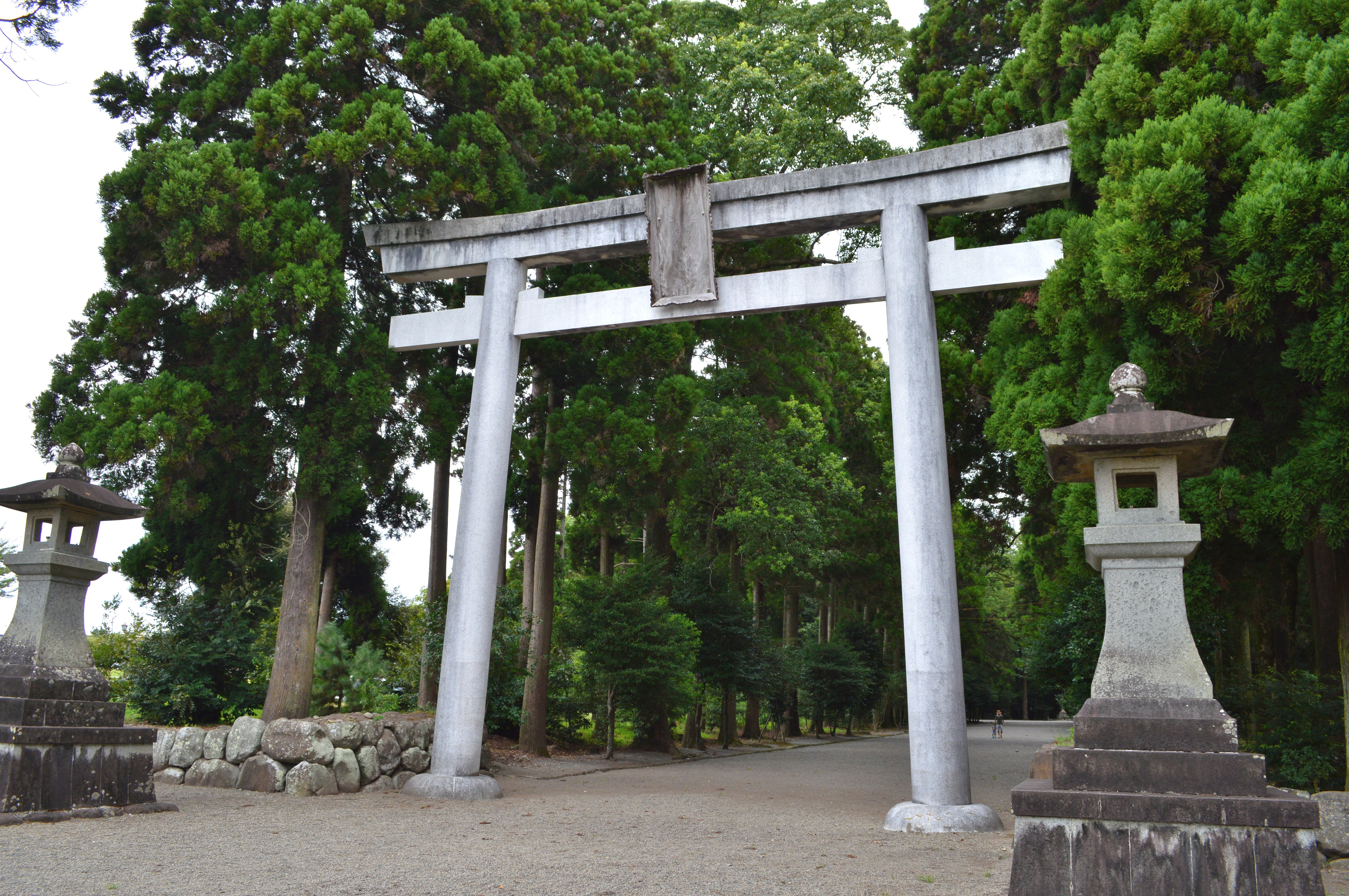 都農神社 南鳥居